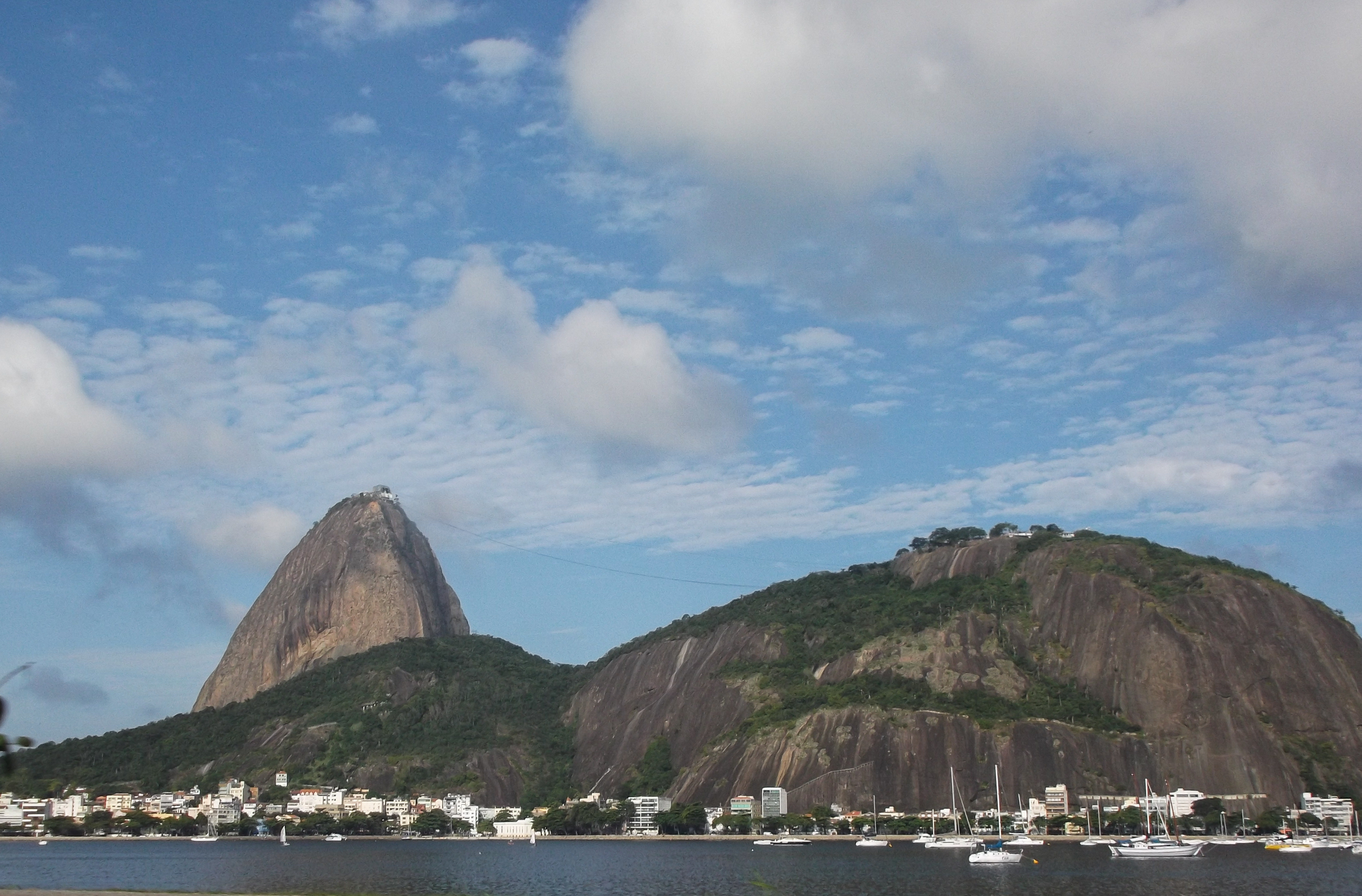 Pão de Açúcar e Morro da Urca vistos do Aterro do Flamengo